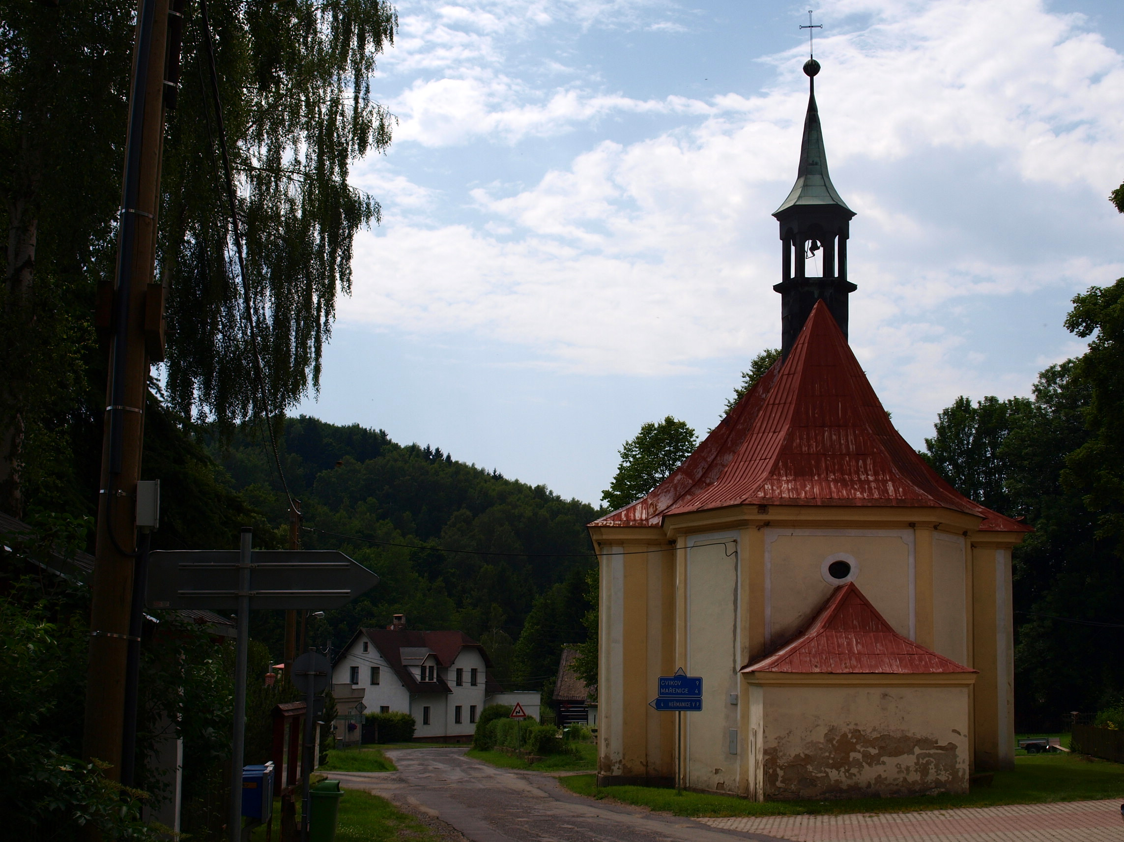 Krompach - náves s kostelem